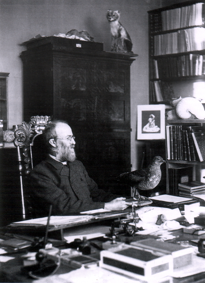 Hans Jakob Sparre Schneider (1853-1918) Entomologist from Norway. Hans Jakob Sparre Schneider